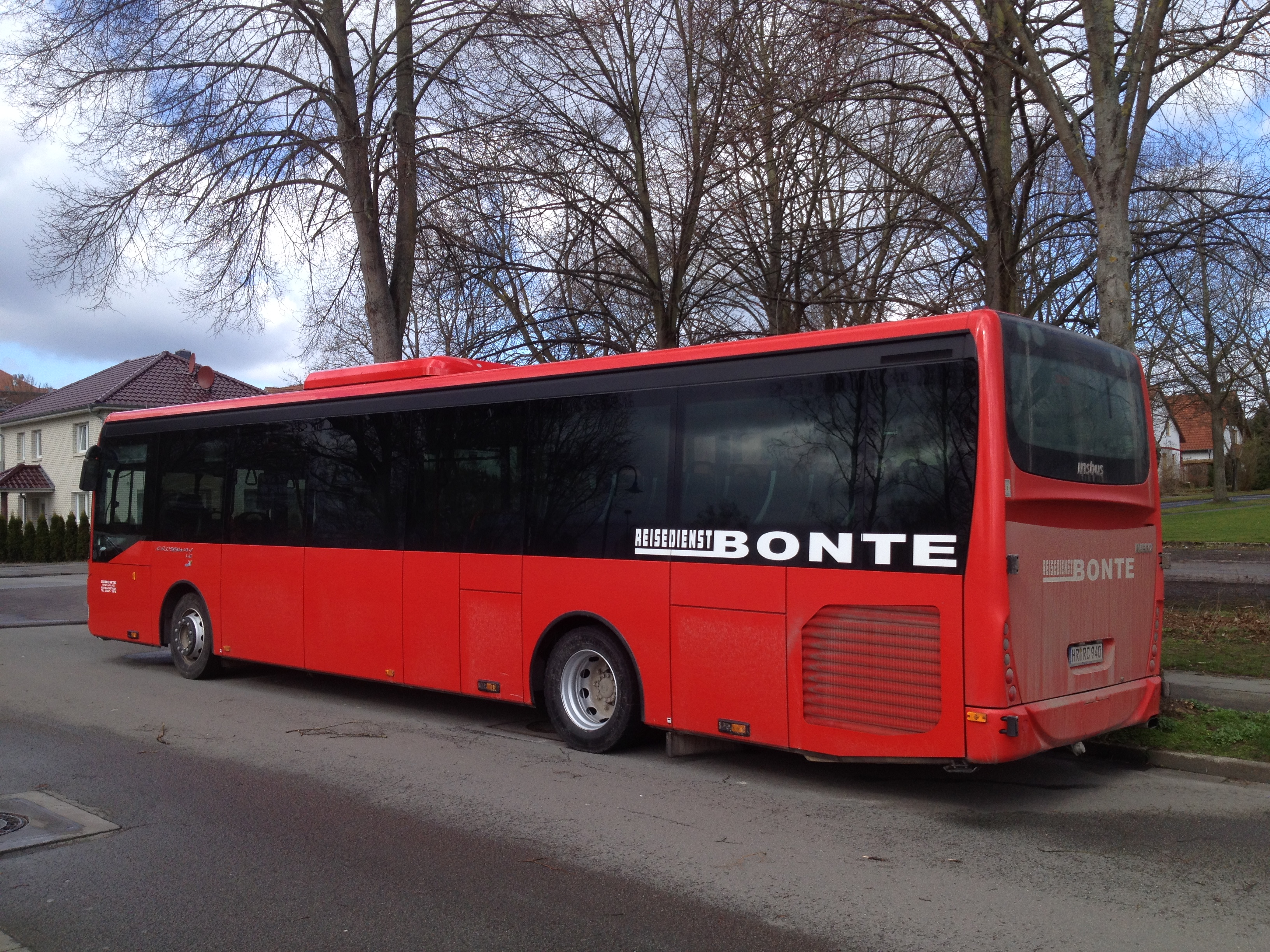 Bus (Irisbus SFR 151 Crossway LE) der Reisedienst Bonte GmbH am ZOB Hofgeismar